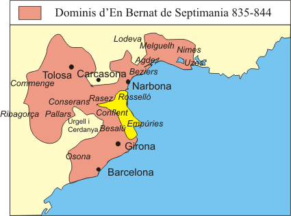 Dominions Bernardo de Septimania 835-844